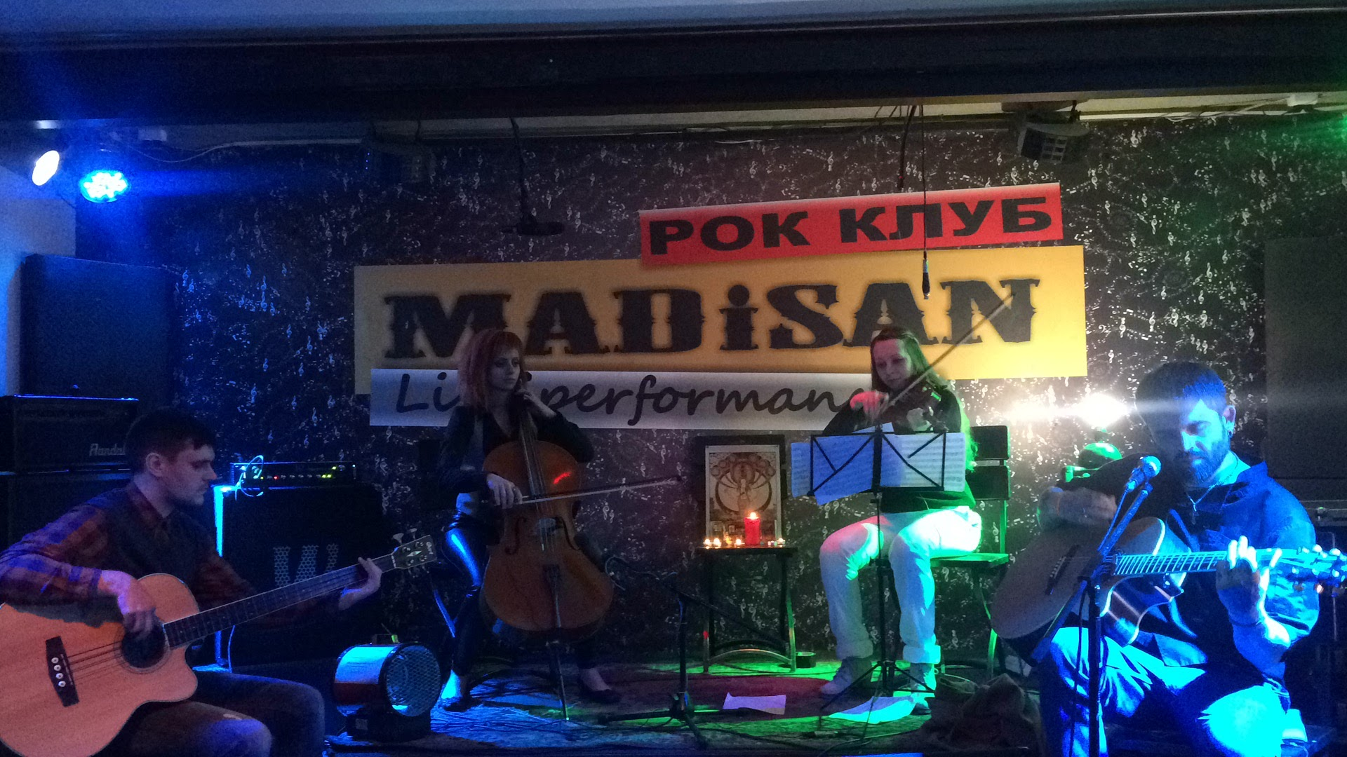 Концерт гурту Пісні Наших Днів (ПНД) у Кривому Розі 4 березня 2017 року.